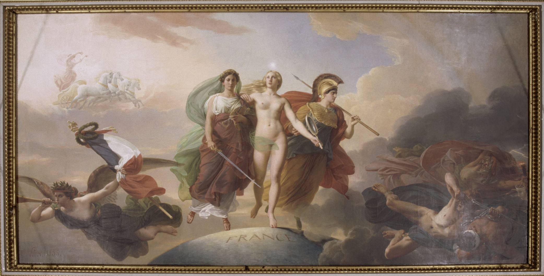 François-Édouard Picot, La Vérité, accompagnée de la Justice et de la Sagesse, protégeant la France contre l'Hypocrisie, le Fanatisme et la Discorde : allégorie des résultats de la Révolution de 1830 (1835)